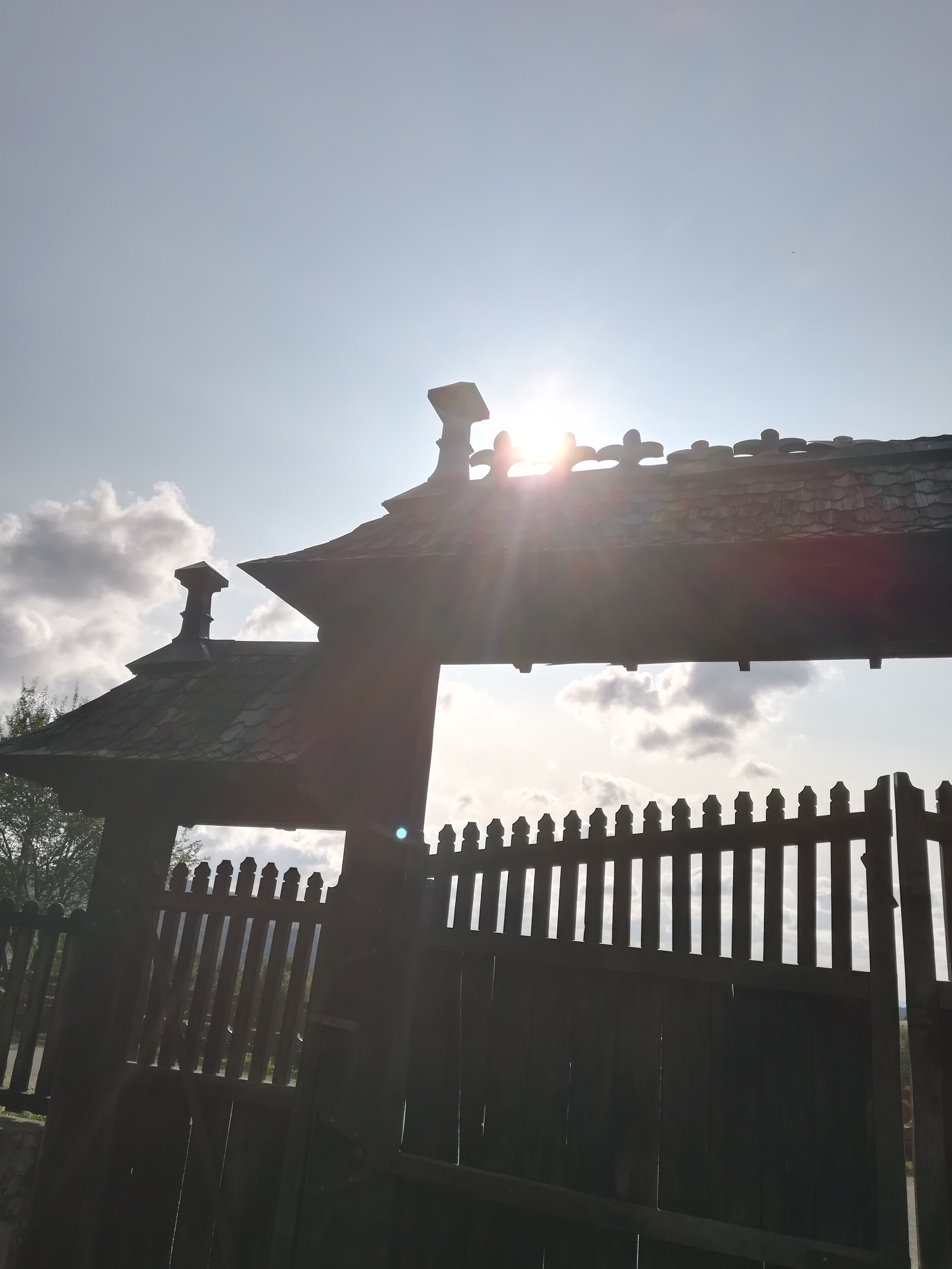 Muzeu - „Casa Mihai Sadoveanu”